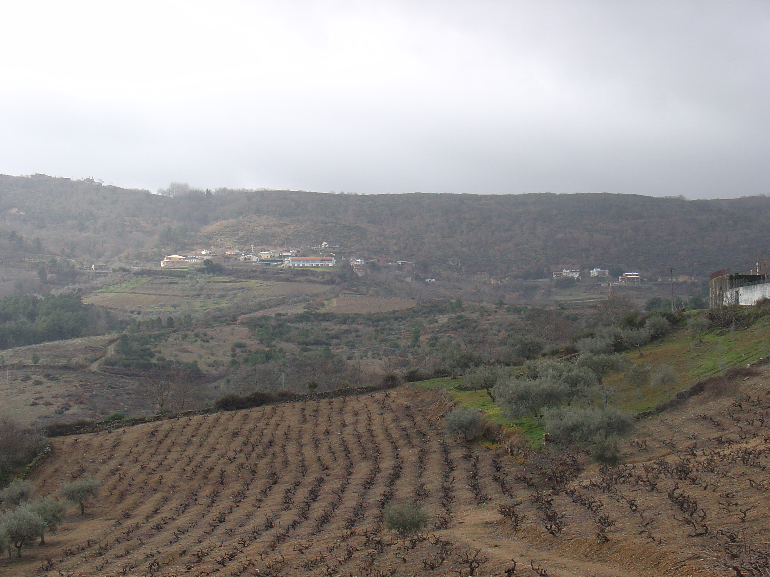 Santigo, a partir de Alvites